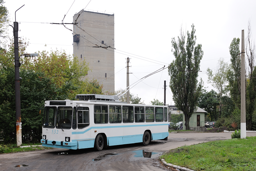 JuMZ T2 532 in Wuhlehirsk